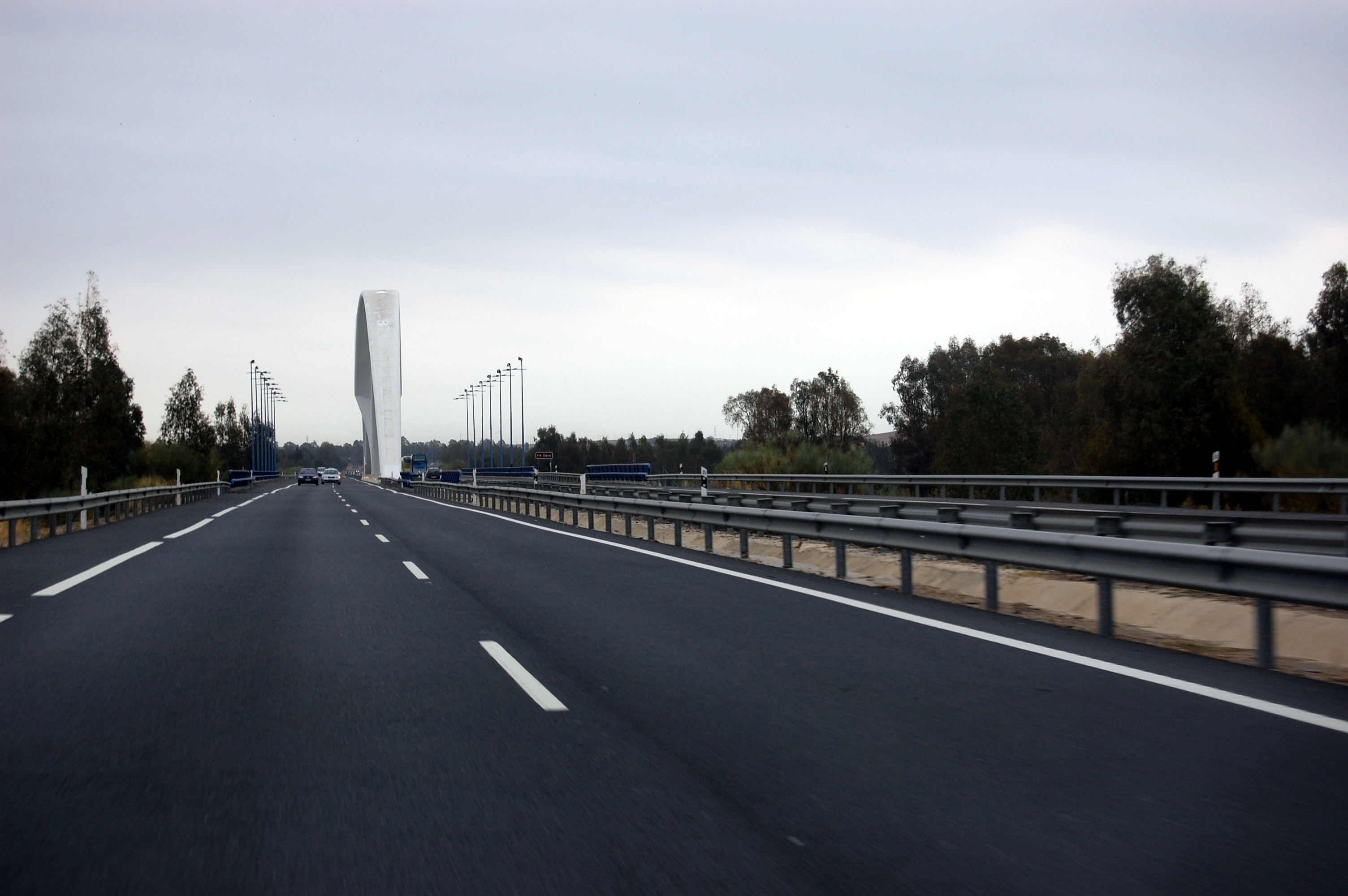 Autovía A-49 en la provincia de Huelva